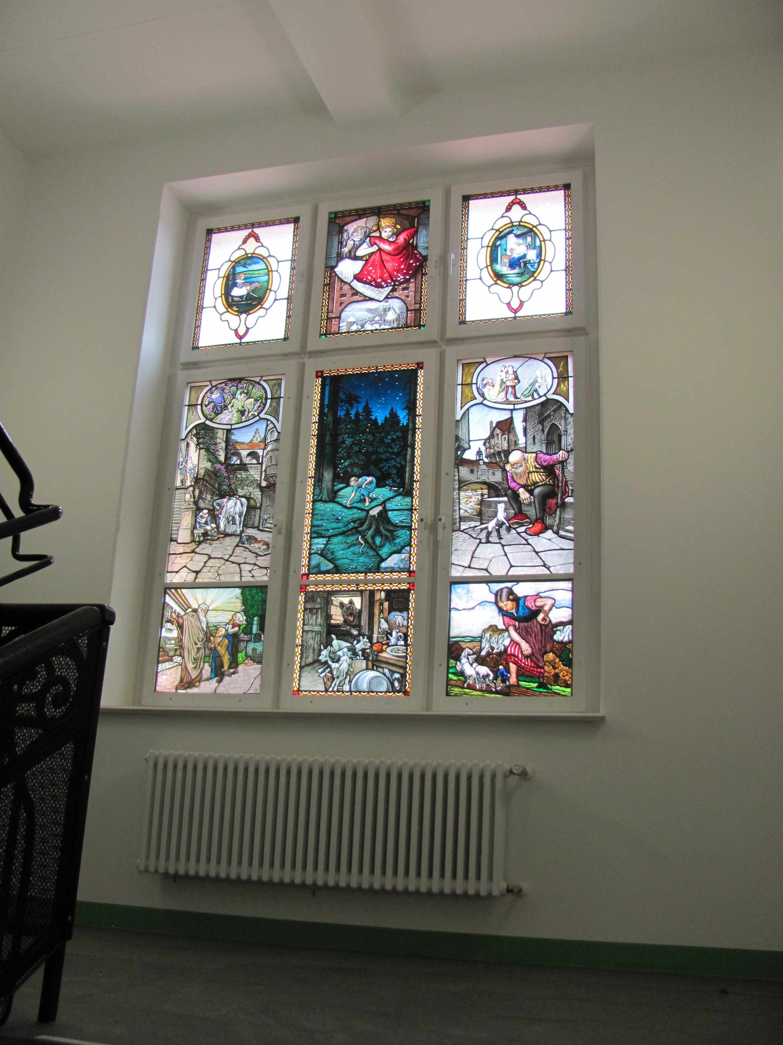 Radebeul-Naundorf Schule